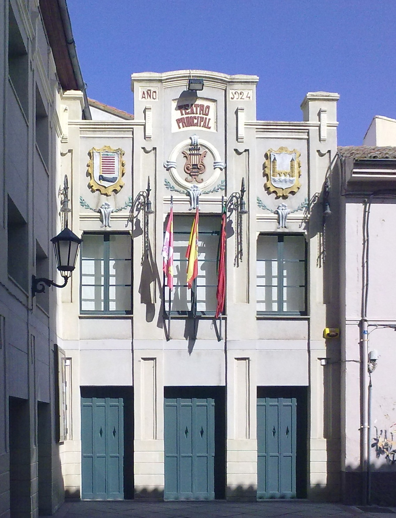 Fachada del Teatro Principal. Zamora.